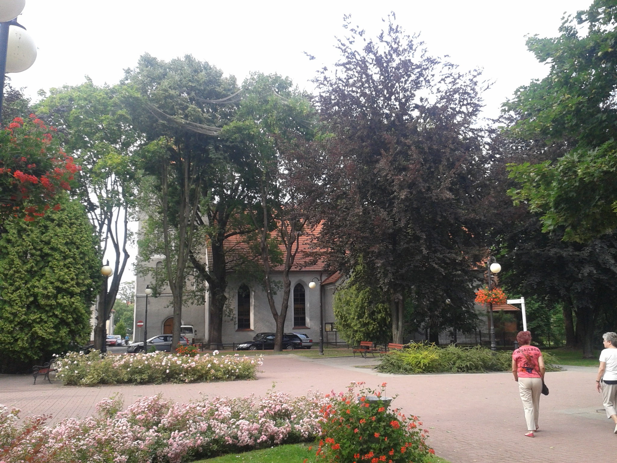 Kościół św. Trójcy w Mrągowie